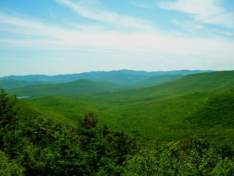 une vue des Catskills